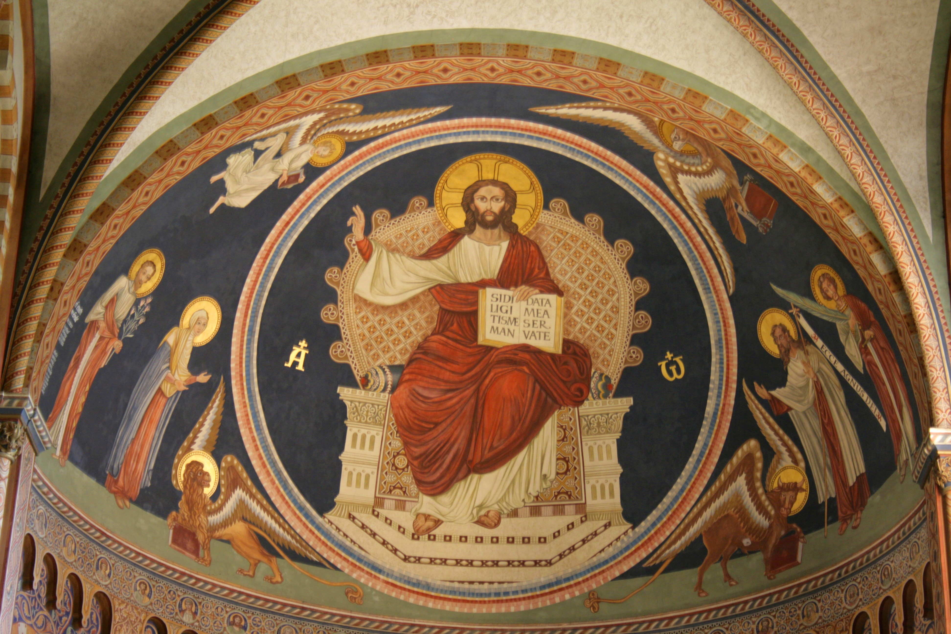 St. Pankratius in Anholt, Isselburg